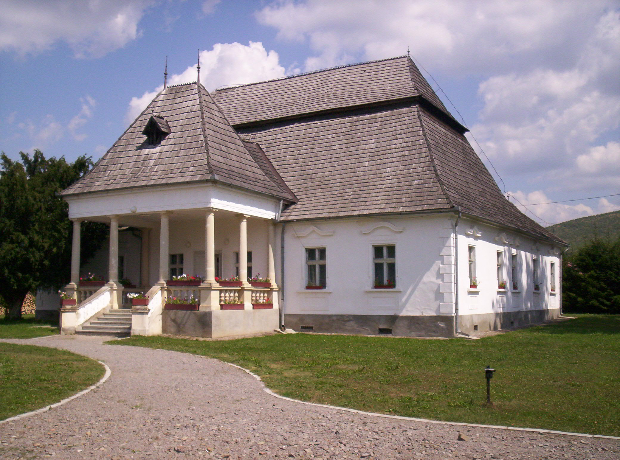 A zágoni Mikes–Szentkereszty-kúria – photo taken by uploader User:Csanády in 2006.